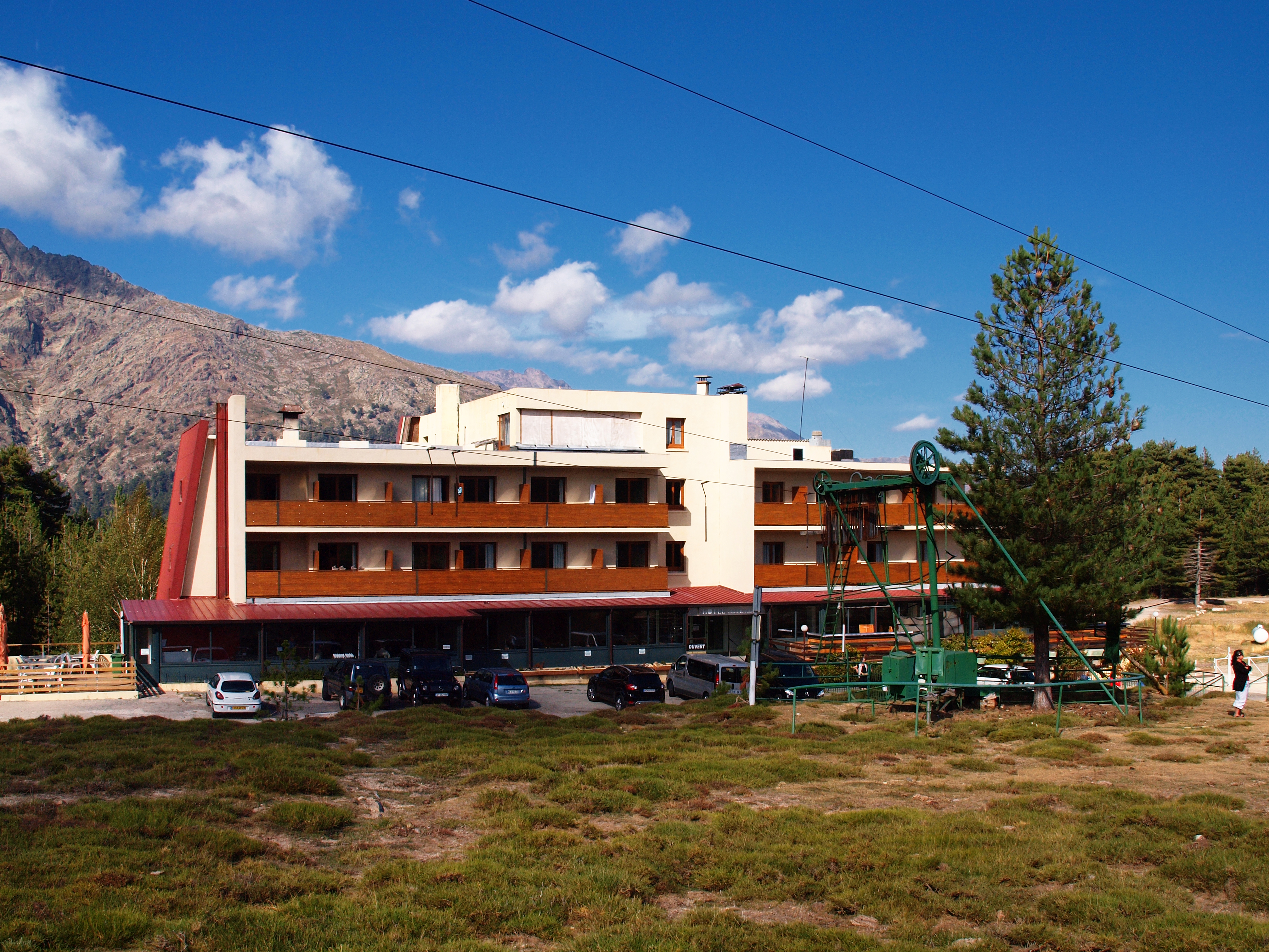 Albertacce, Niolo (Haute-Corse) - Station de ski de Vergio : hôtel Castel de Vergio